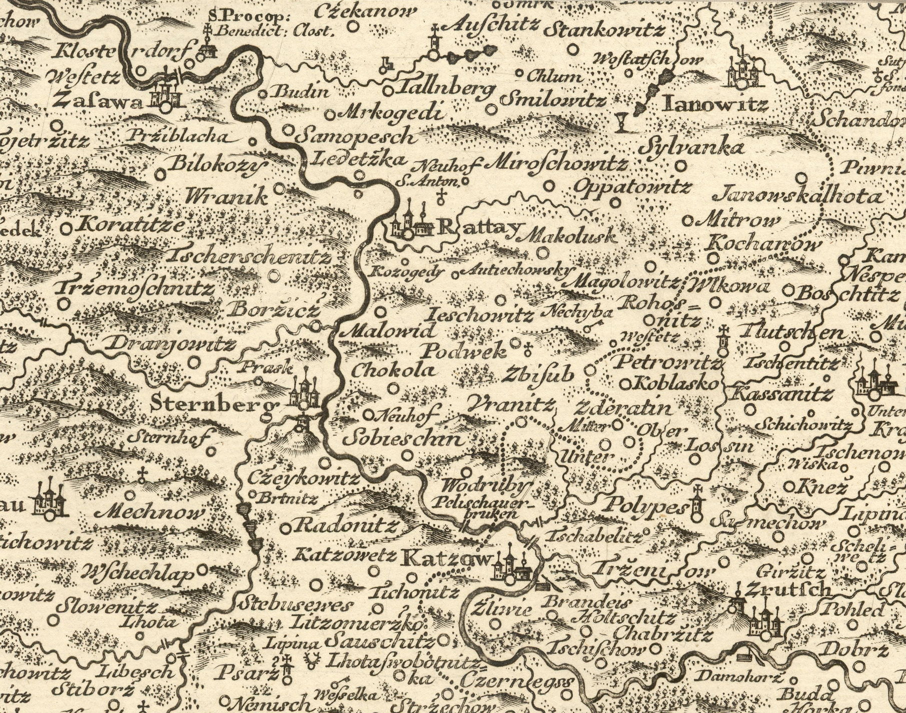 Posázaví mezi Ratajemi a Kácovem na Müllerově mapě Čech z roku 1720, detail mapového listu č. 13.